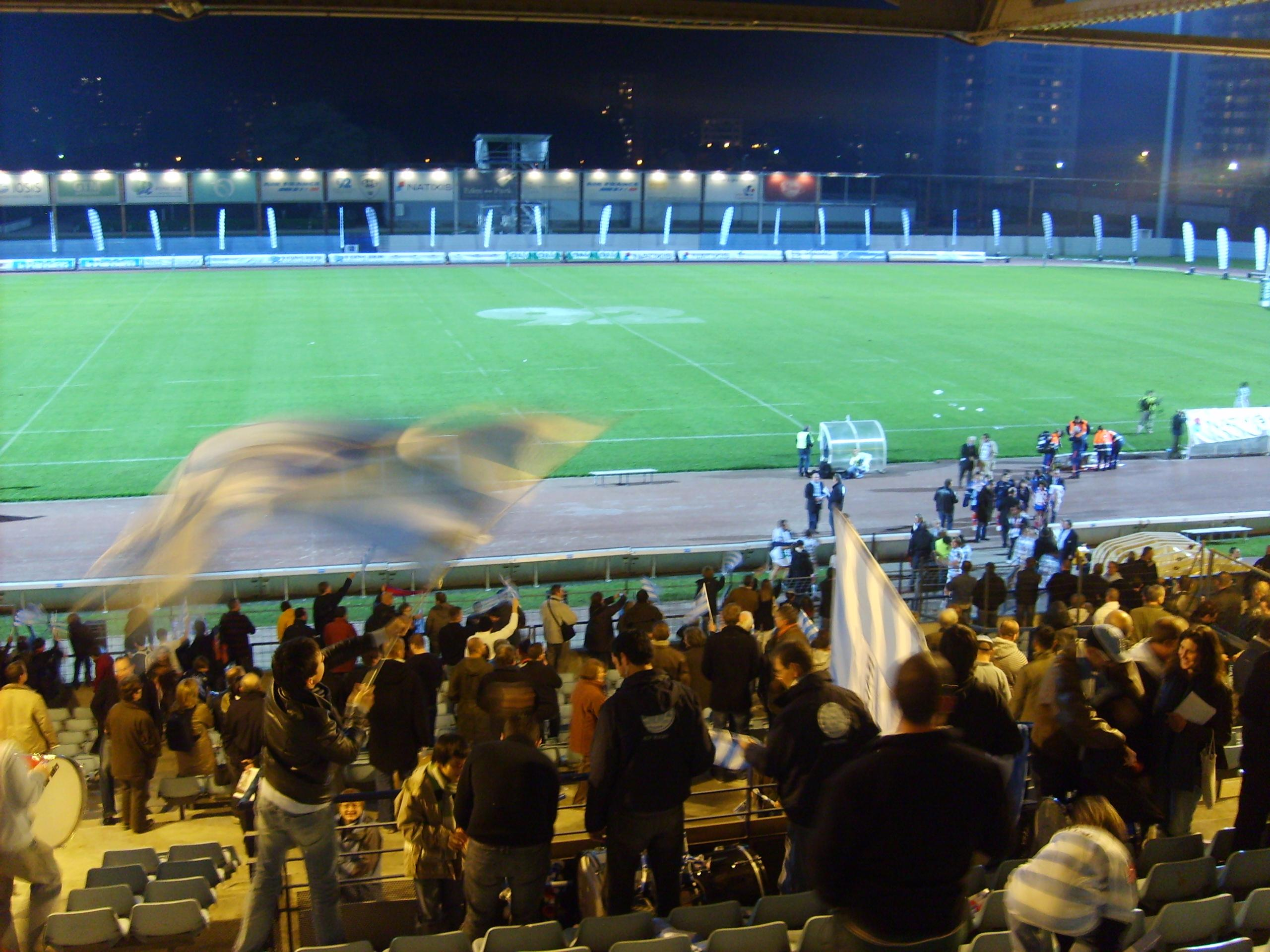 Stade Yves-du-Manoir; (JO 1924) Colombes; Paris; France